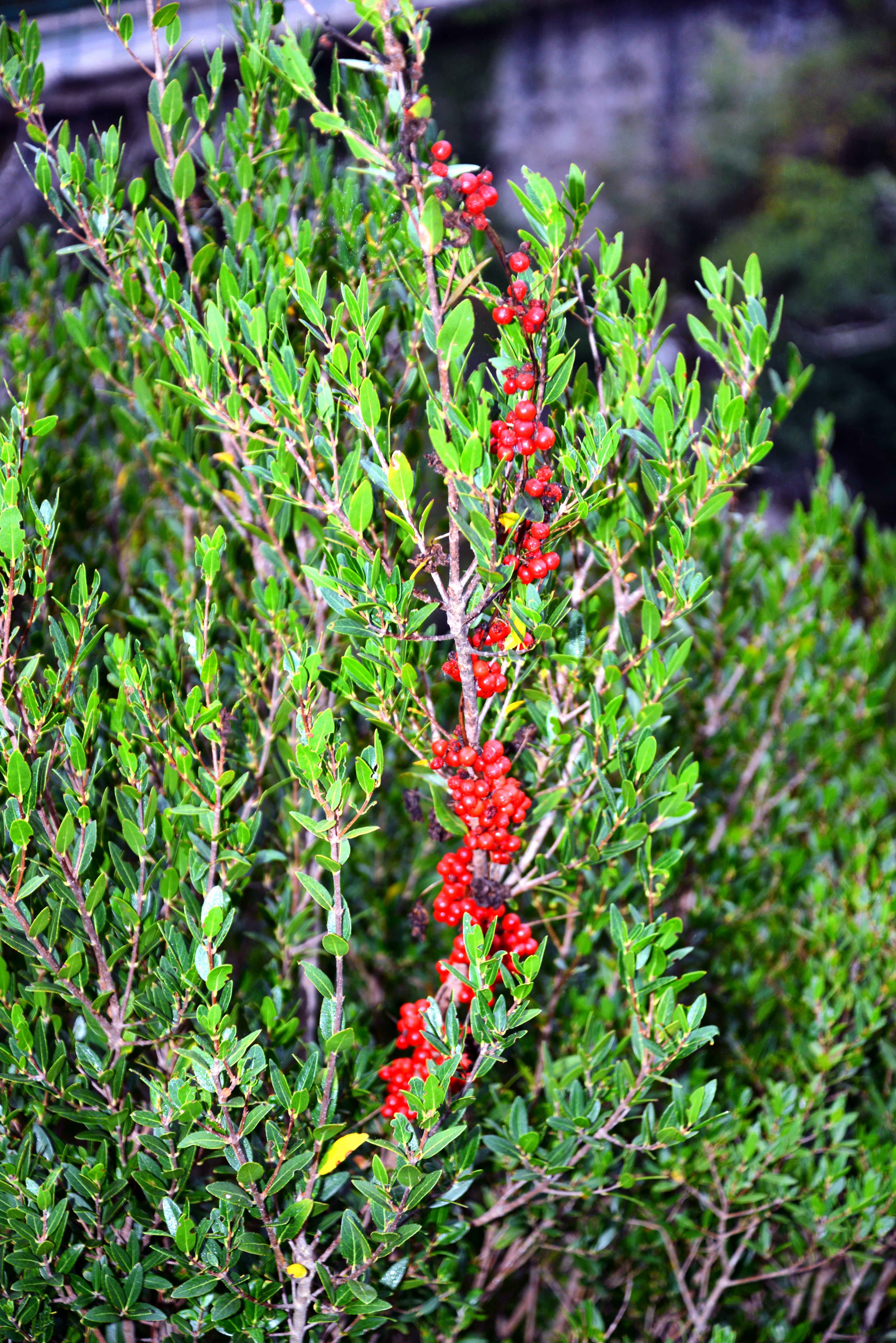 Fruits de Salsepareille (Smilax aspera) sur Filaire à large feuille (Phillyrea latifolia) - Photographie près du pont de Noceta, Centre Corse.